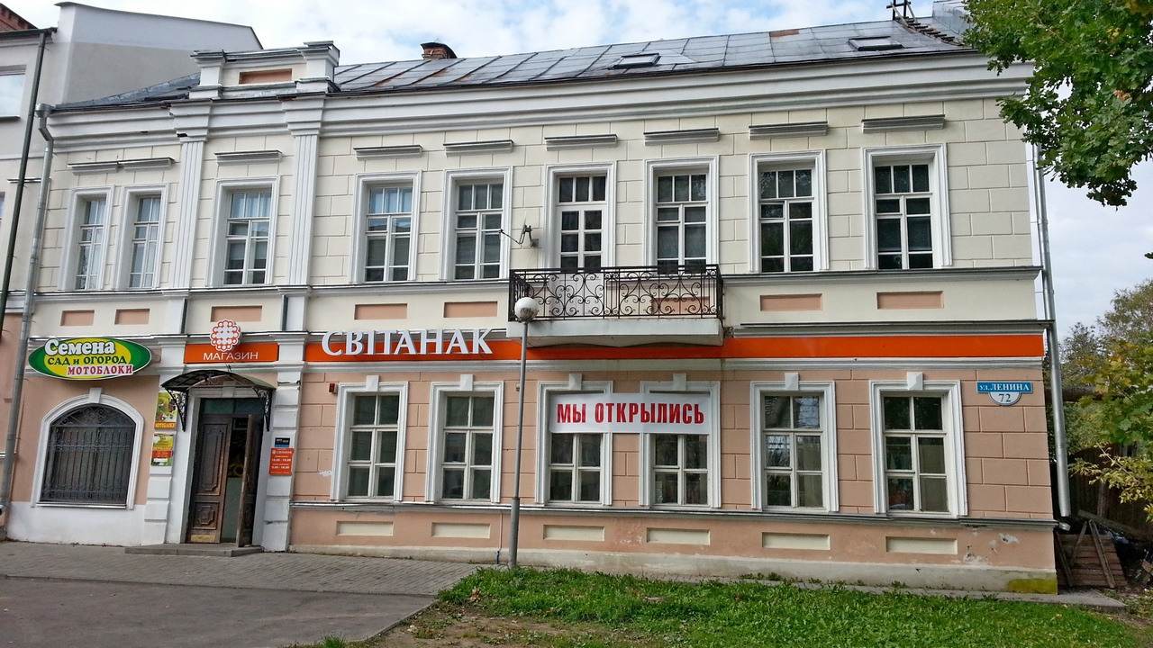 Беларуская (тарашкевіца): Забудова вул. Леніна. г. Віцебск This is a photo of Belarusian heritage monument. Reference number: 213Г000049 ( WLM)